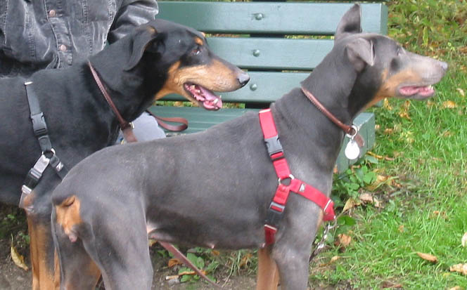 Two Doberman Pinschers